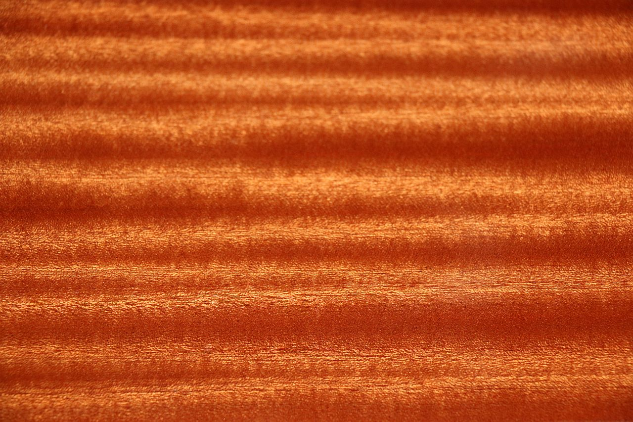 Mahagoni Furnier hochglanzlackiert